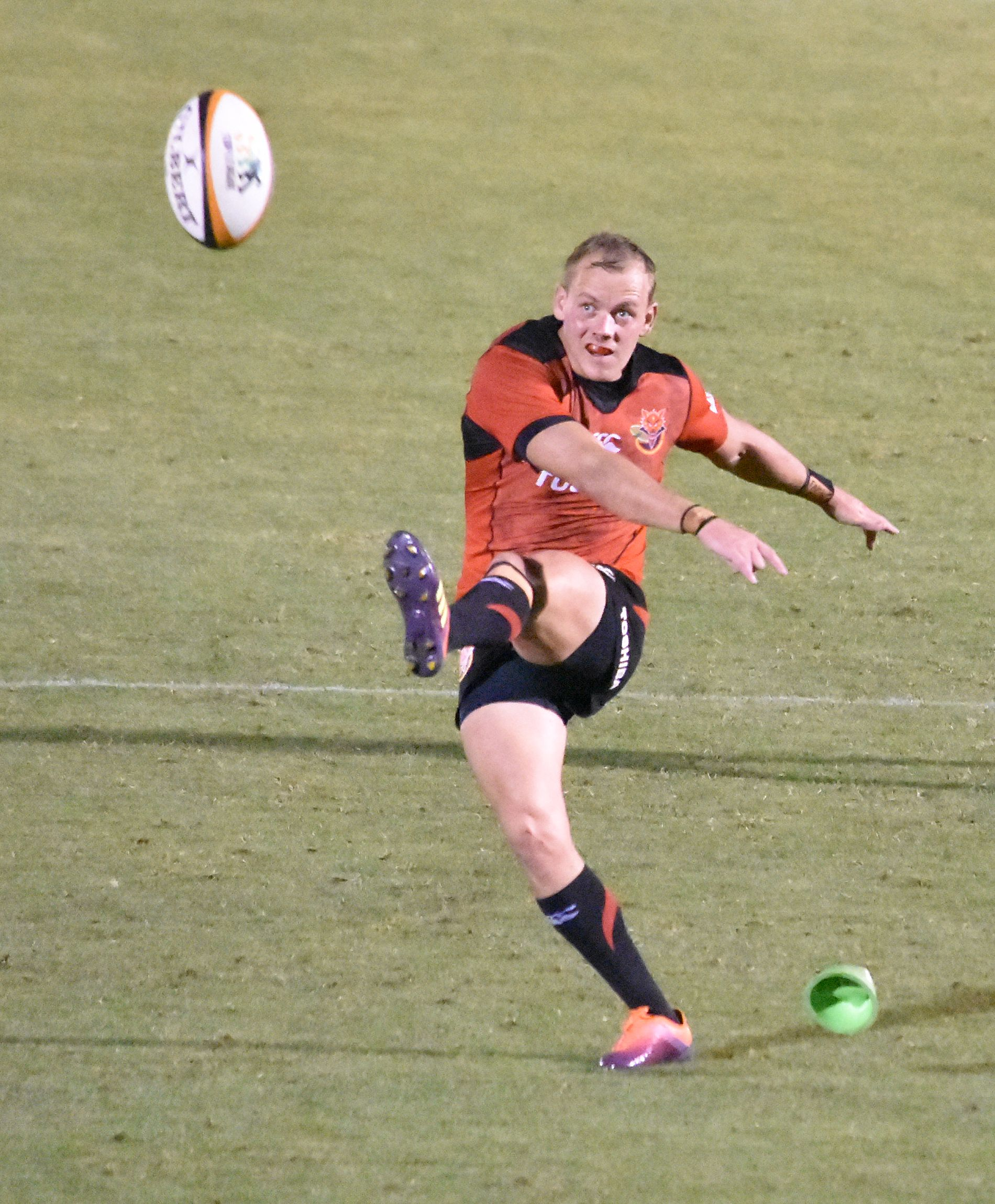 コンラッド・バンワイク